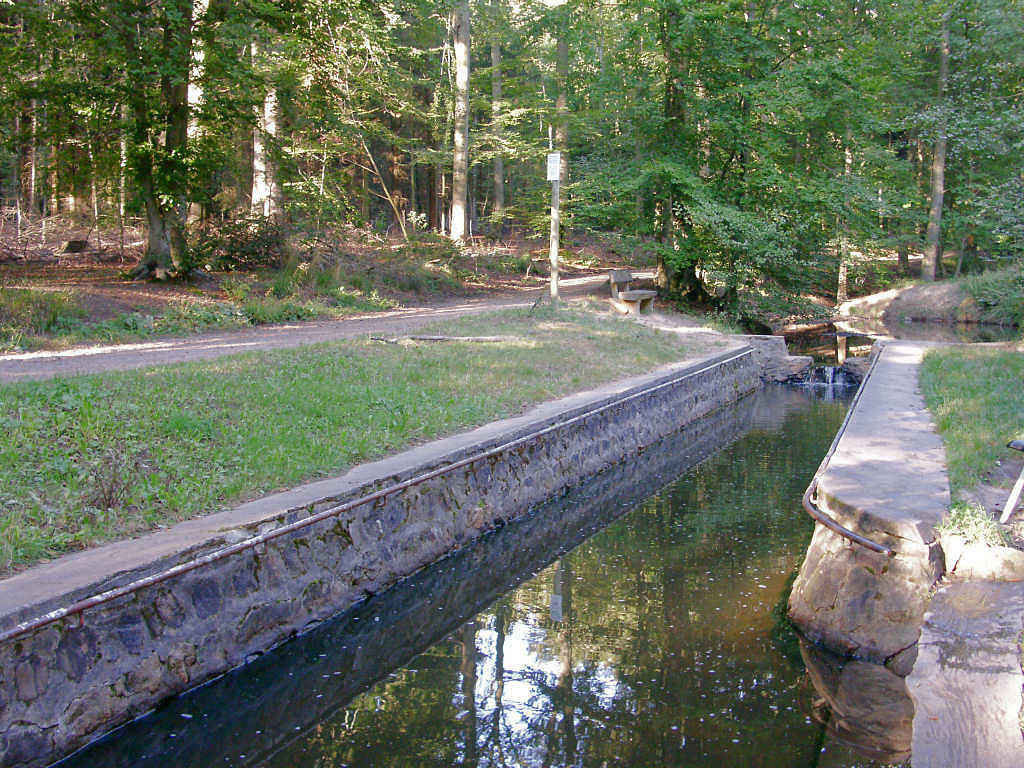 Vom Giesbach durchflossene Wassertretstelle im Naturschutzgebiet „Königsforst“ (NSG GL-038) im Stadtgebiet von Bergisch Gladbach; Blick bachaufwärts. Die Tretstelle ist nur wenige Meter von der Wegespinne am Rath-Forsbacher-Weg entfernt, wo die Stadtgebiete von Bergisch Gladbach (Gemarkung Bensberg-Honschaft), Rösrath (Gem. Forsbach und Volberg) und Köln (Gem. Heumar und Rath) aneinander grenzen.